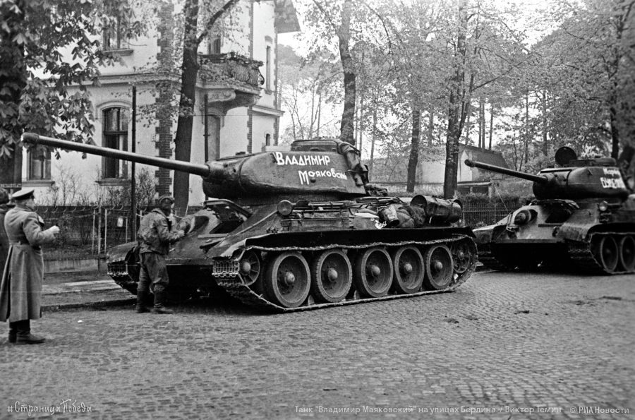 Carri della Prima armata corazzata della Guardia si preparano ad attaccare il Tiergarten di Berlino